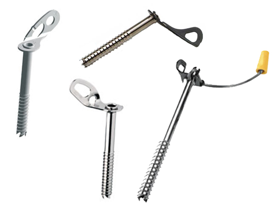 Klim IJsvijs IJsboor (Klimmateriaal)